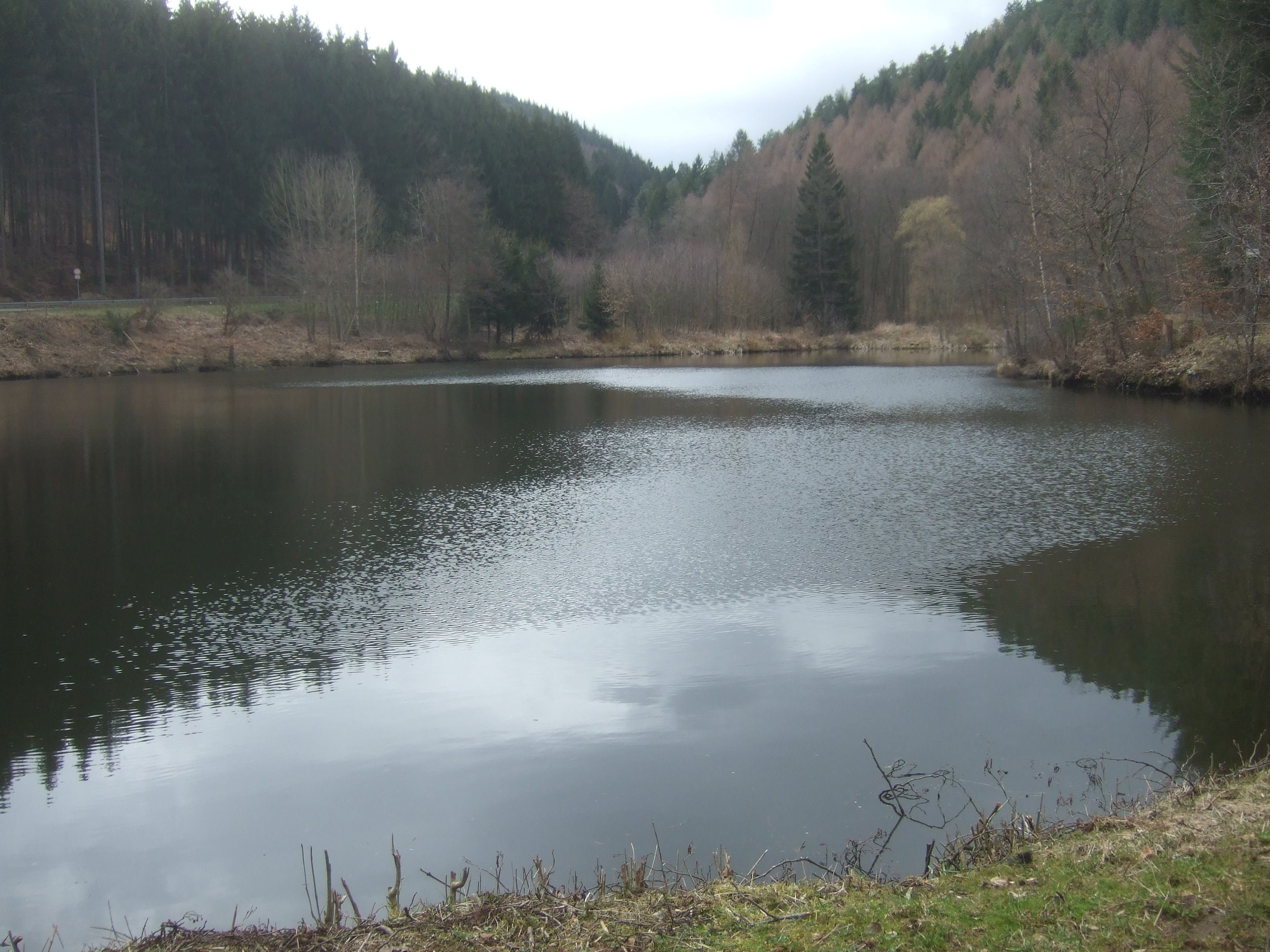 Wolfskaulerweiher am Quintbach